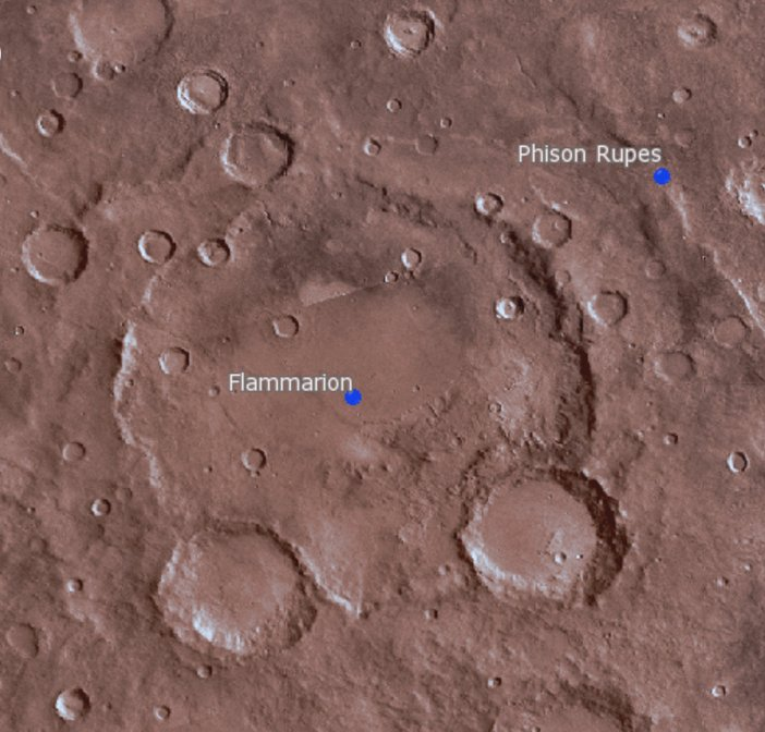 Cráter marciano Flammarion. (IAU/USGS/Goddard/A SU/USGS)